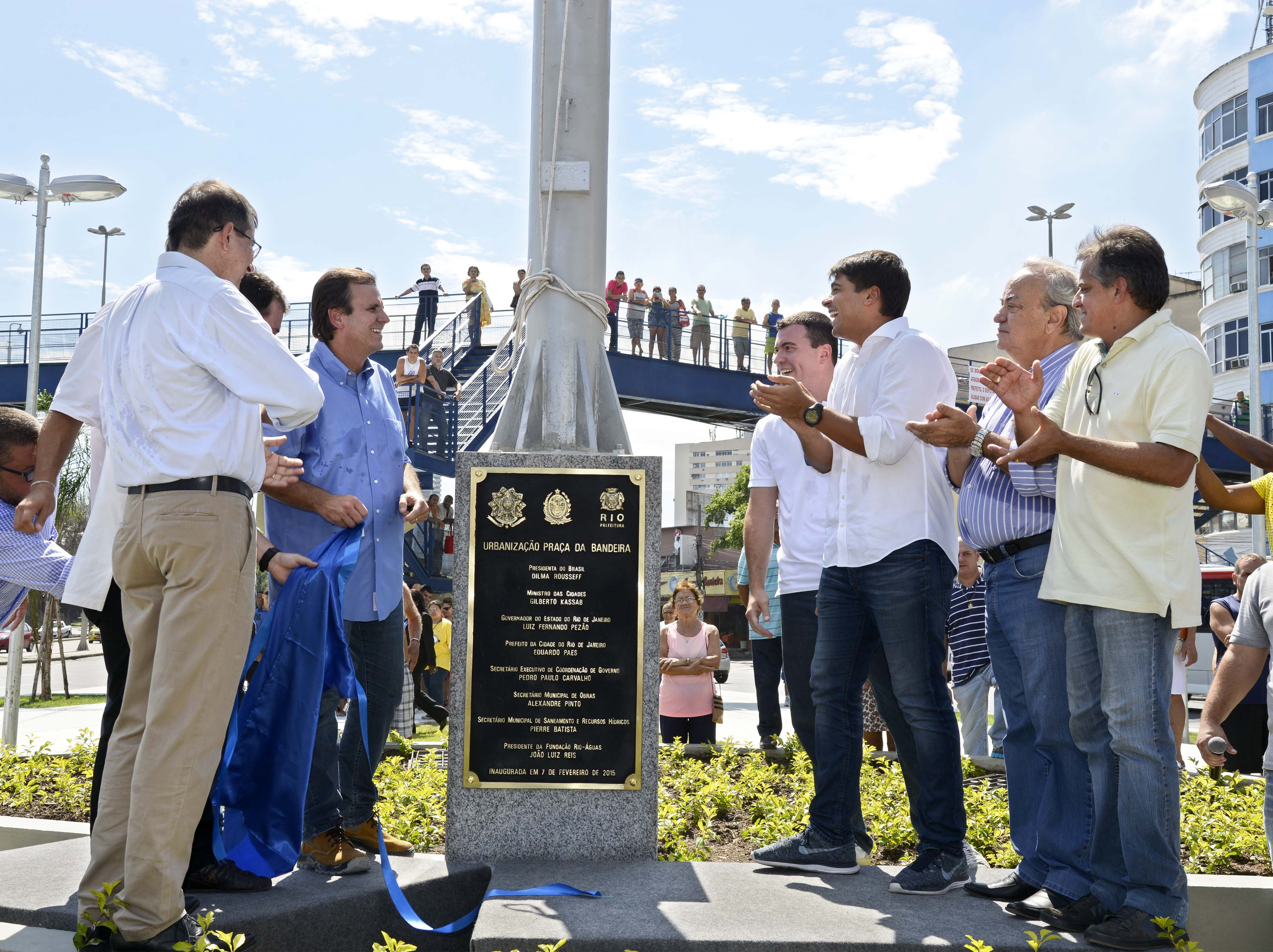 Cerimônia de inauguração da nova urbanização da Praça da Bandeira, situada no bairro homônimo da cidade do Rio de Janeiro, em 2015.